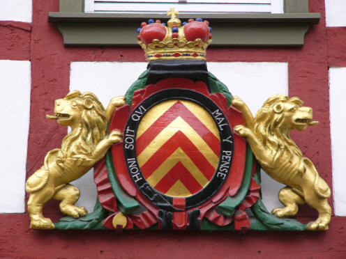 Altheim